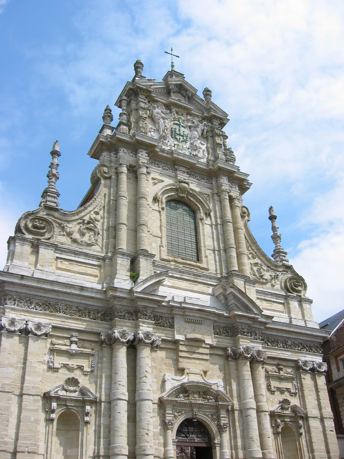 De Sint-Michielskerk in Leuven. (Gemaakt in juni 2006)